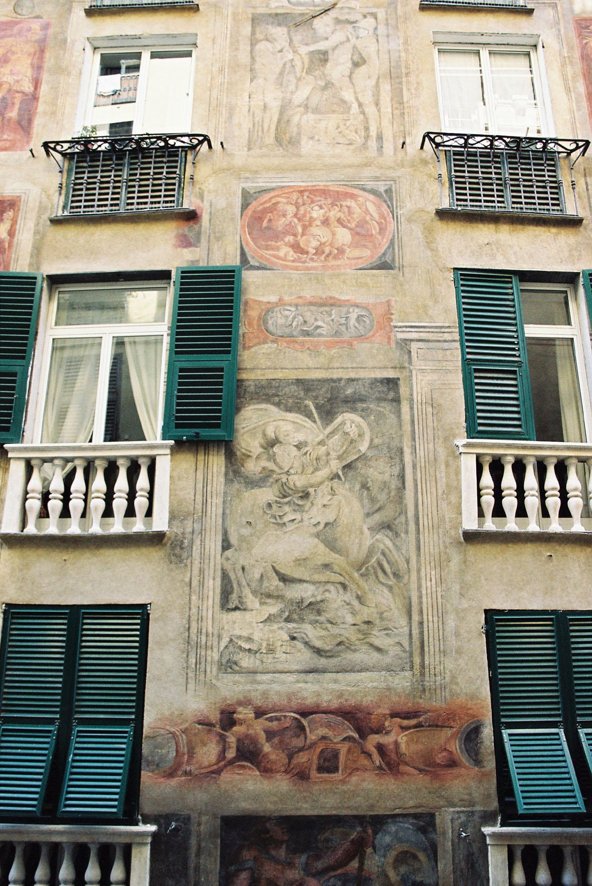 Facciata di Via Lomellini 4 in Genova Italia, Affresco di Luca Cambiaso del 1543-1544 con scene di imprese romane